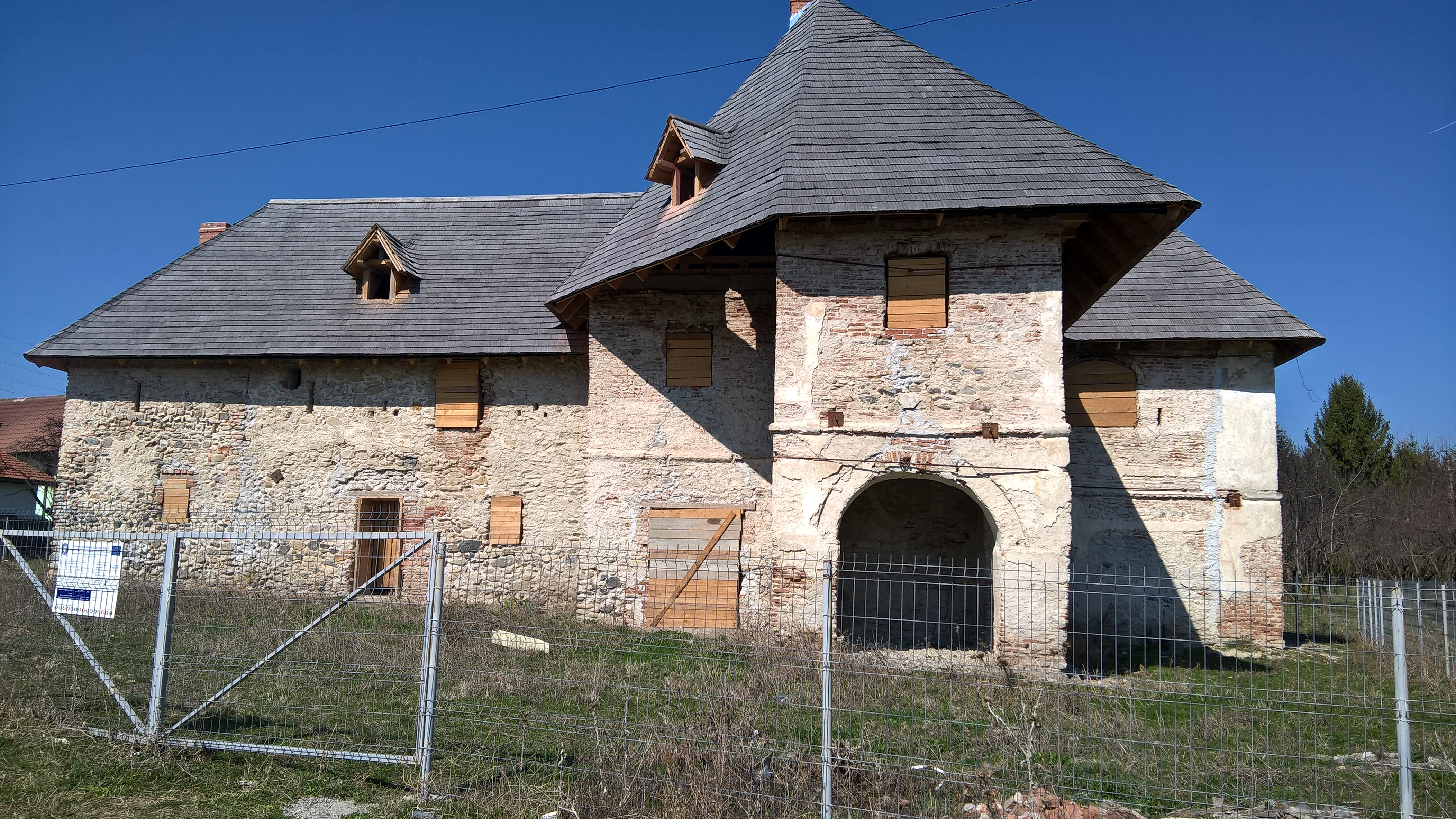 Cula Sultănica 01